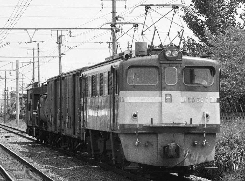 国鉄ED60 7けん引貨物列車